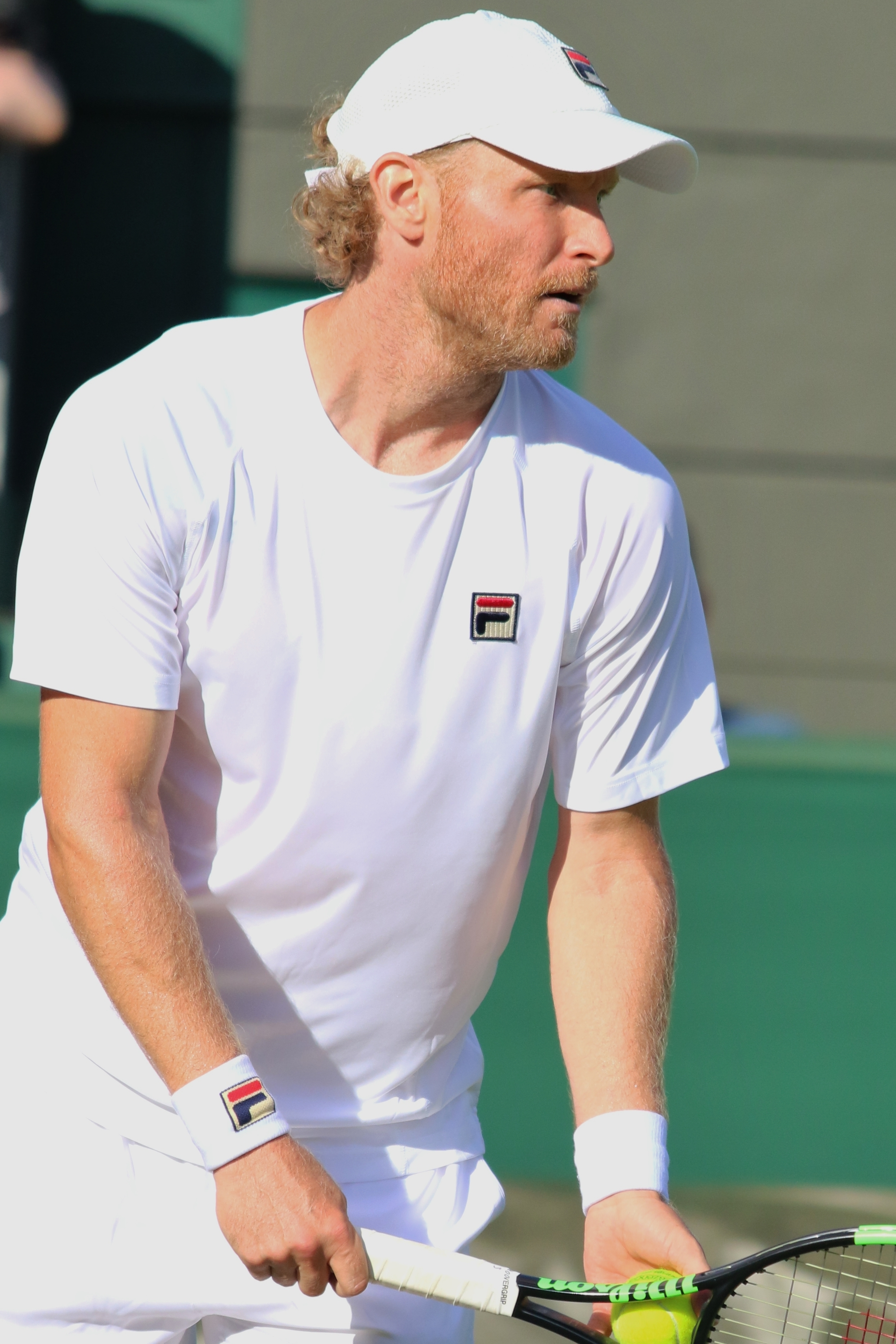 Tursunov WM17 (4)